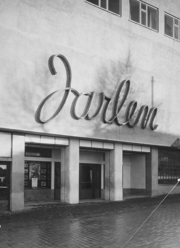 Fasaden på Jarlen kino